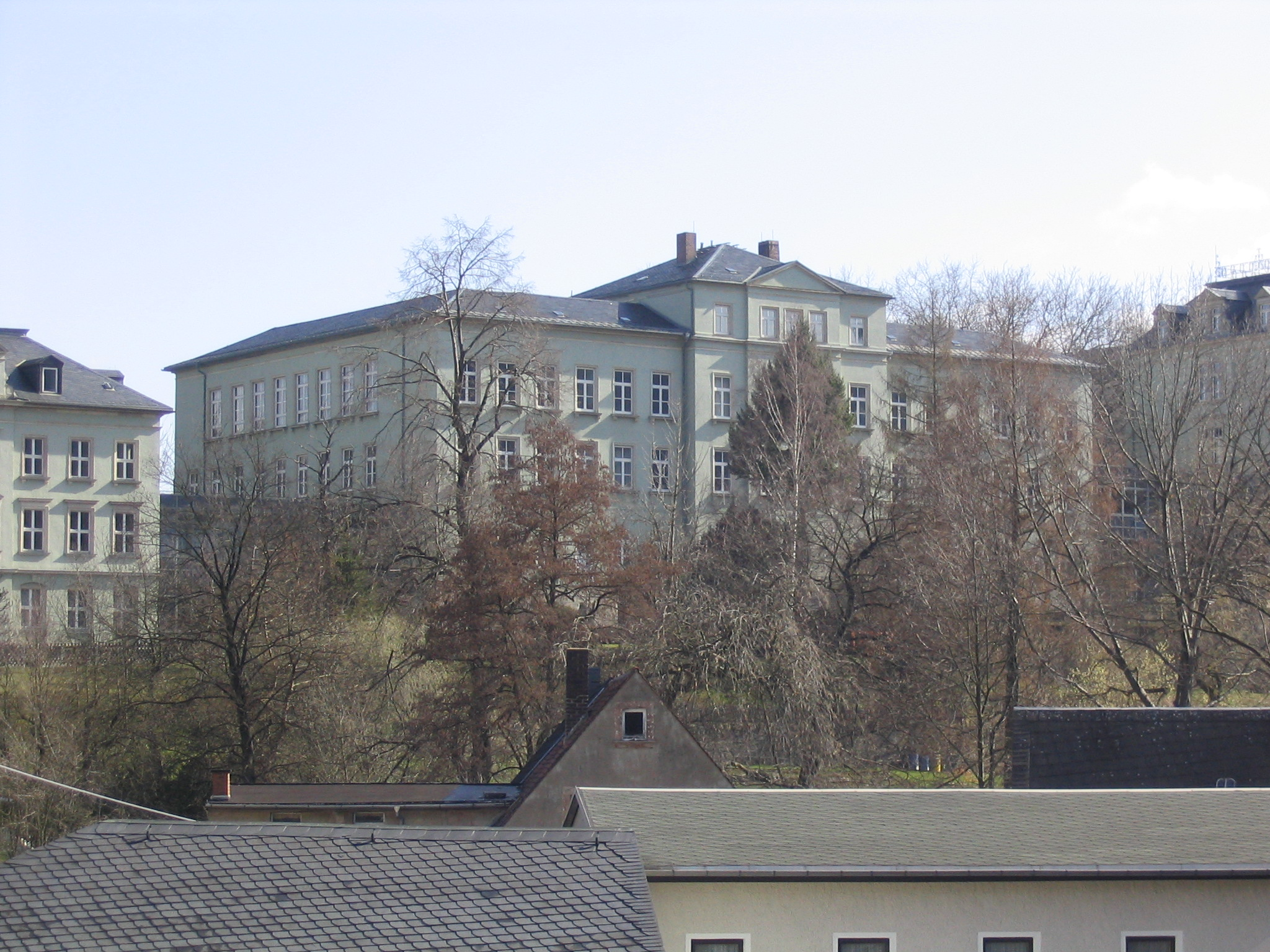 Gymnasium Zschopau, Mittleres Gebäude von der Brücke aus gesehen, Aufgenommen am 15.04.2006 von Dr. Hagen Graebner